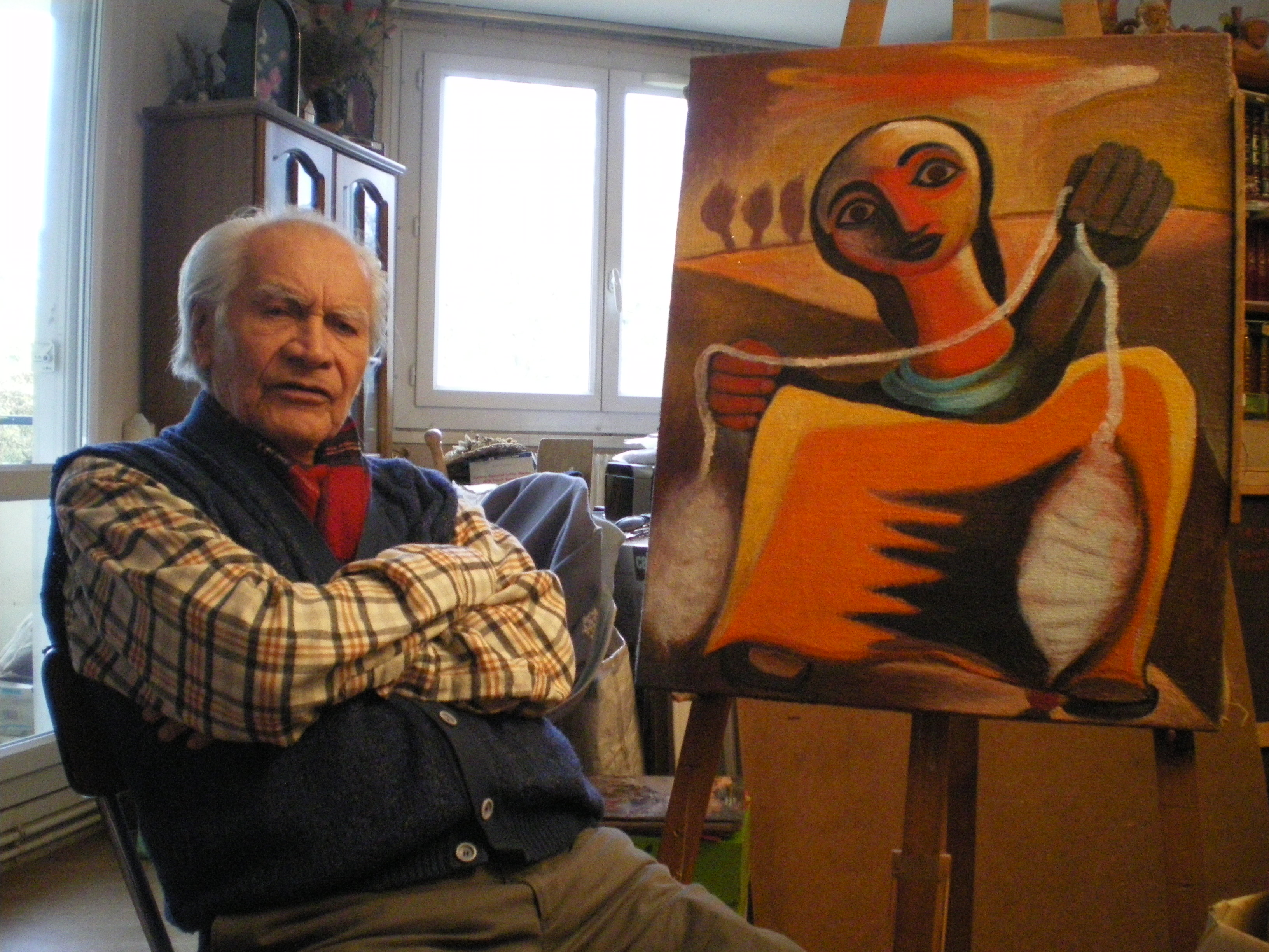 L'artiste devant son tableau la Fileuse de 2008.